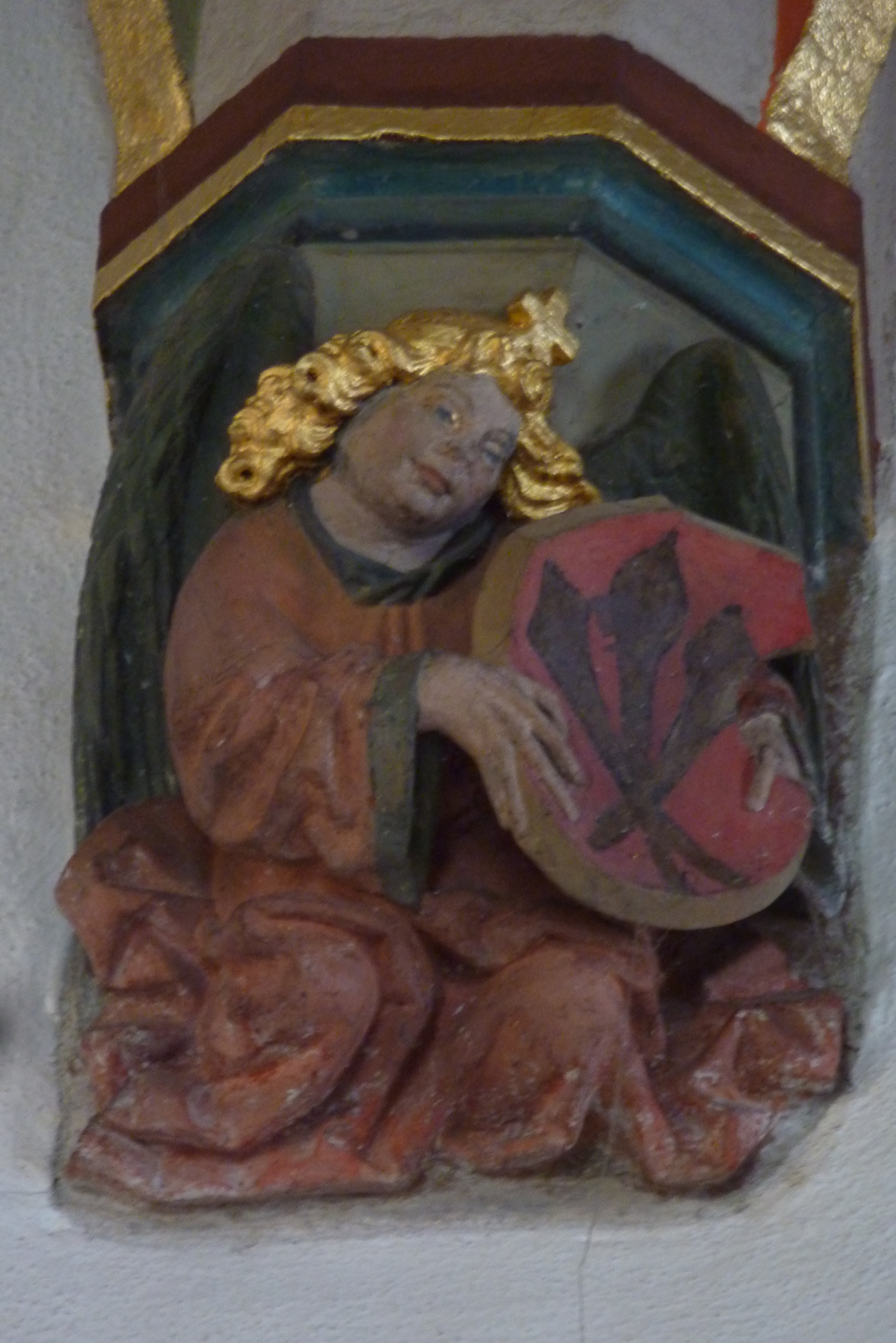 Stadtkirche in Rosenfeld im Zollernalbkreis (Baden-Württemberg/Deutschland), Konsole im Chor